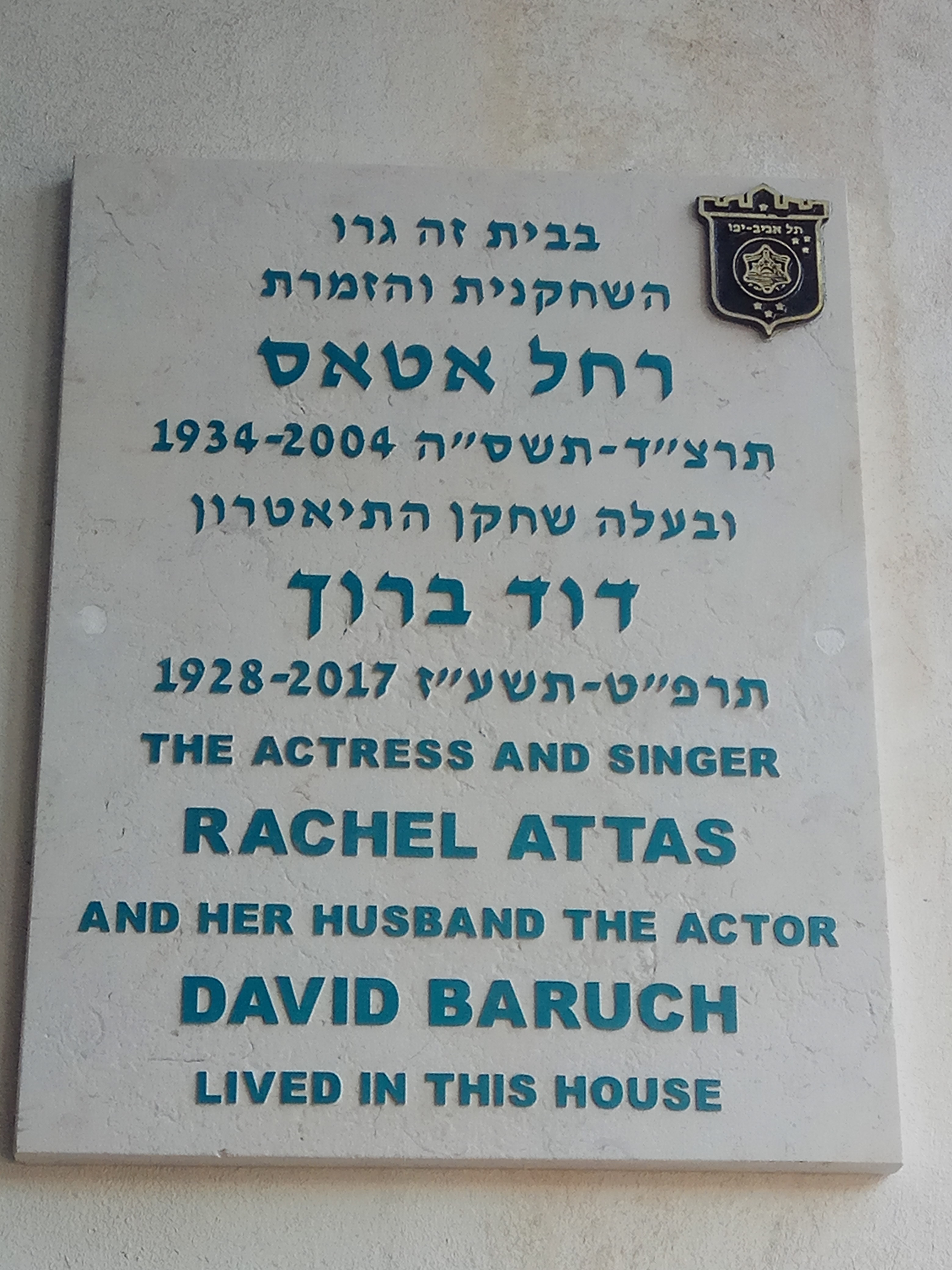 לוחית זיכרון לרחל אטאס ודוד ברוך ברחוב שינקין 22 בתל אביב